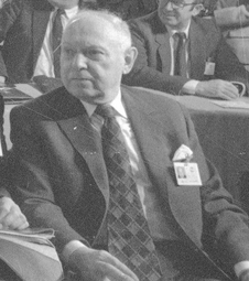 Adam Schaff - Kongres Intelektualistów w Obronie Pokojowej Przyszłości Świata w Hotelu Victoria w Warszawie (1986-01-16)